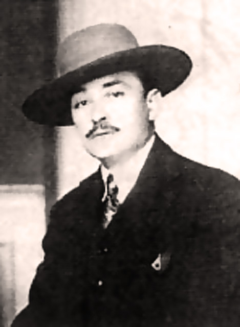 Joseph d'Arbaud, écrivain provençal et manadier en Camargue